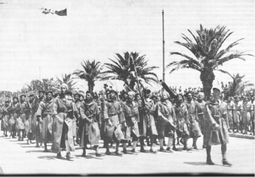 Le défilé de la libération, Tunis, Tunisie. Des goumiers marocains reconnaissables à leurs vêtements, qui ont participé aux combats, défilent dans Tunis.